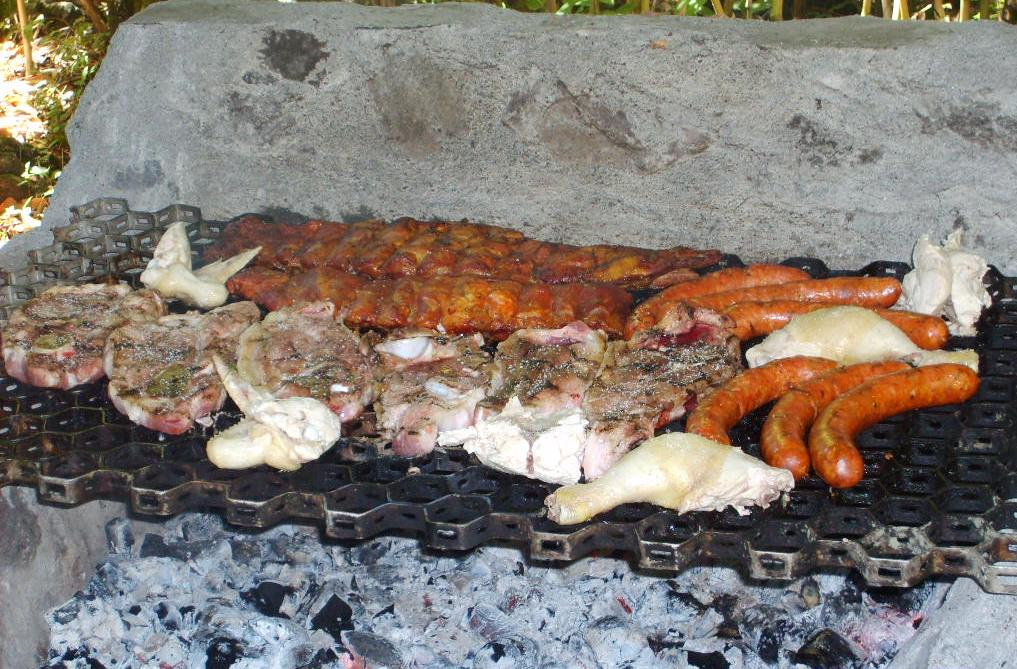 fotografia de un asado con distintos tipos de carnes